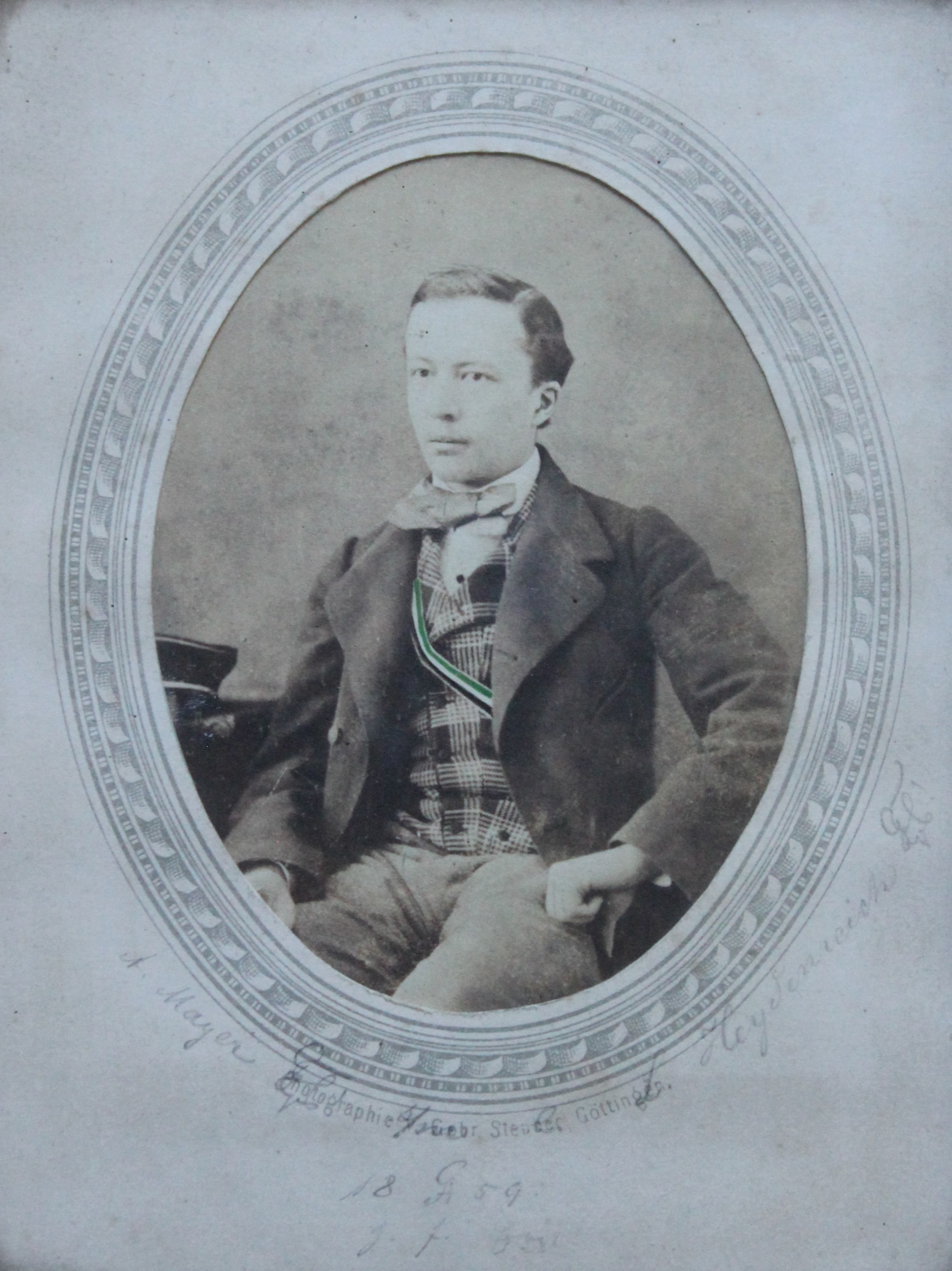 Porträtfotografie des späteren Mathematikers Adolph Mayer (1839–1908) als Student in Göttingen